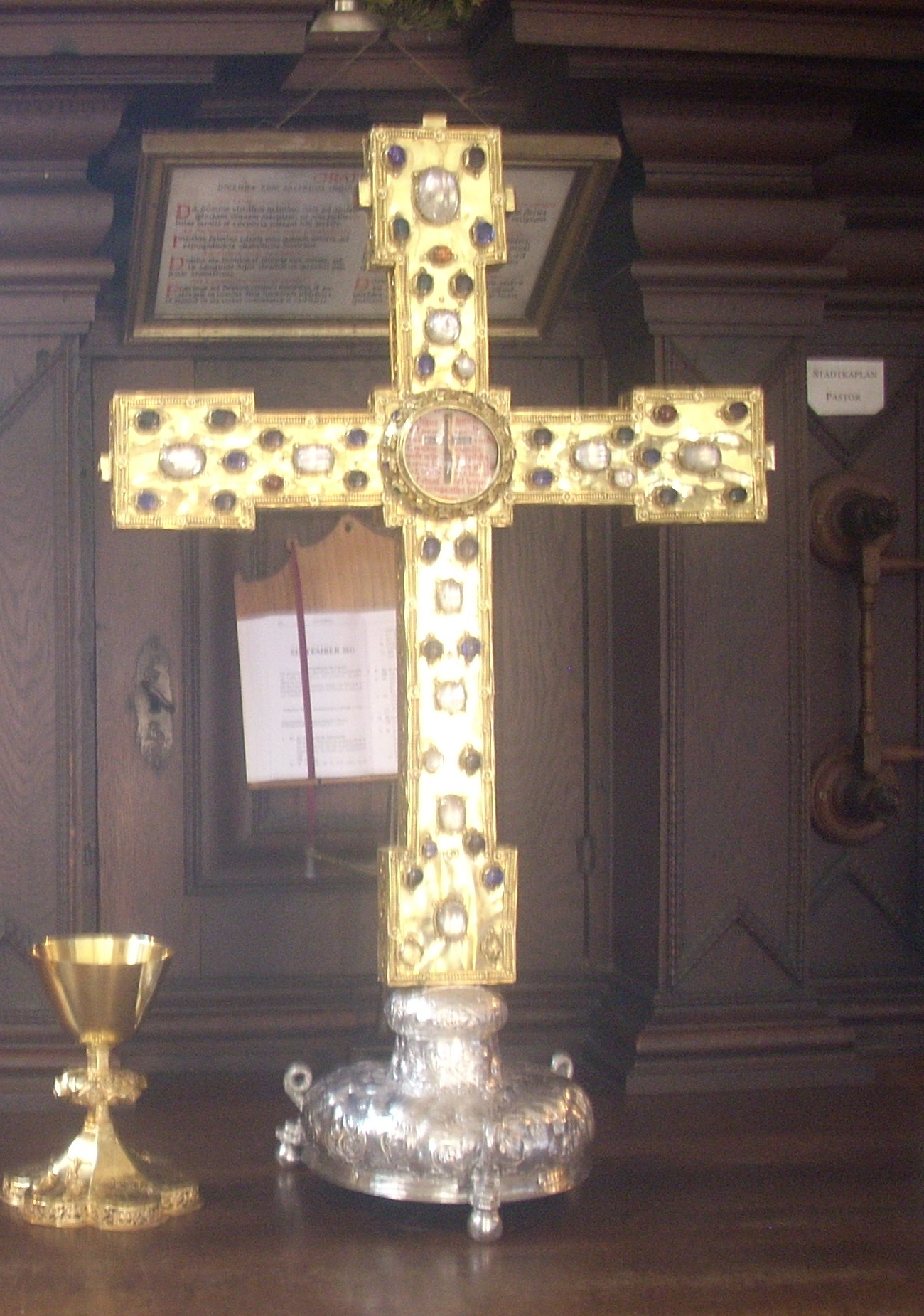 Duderstadt, St. Cyriakus, Kreuzreliquiar Nordhäuser Kreuz